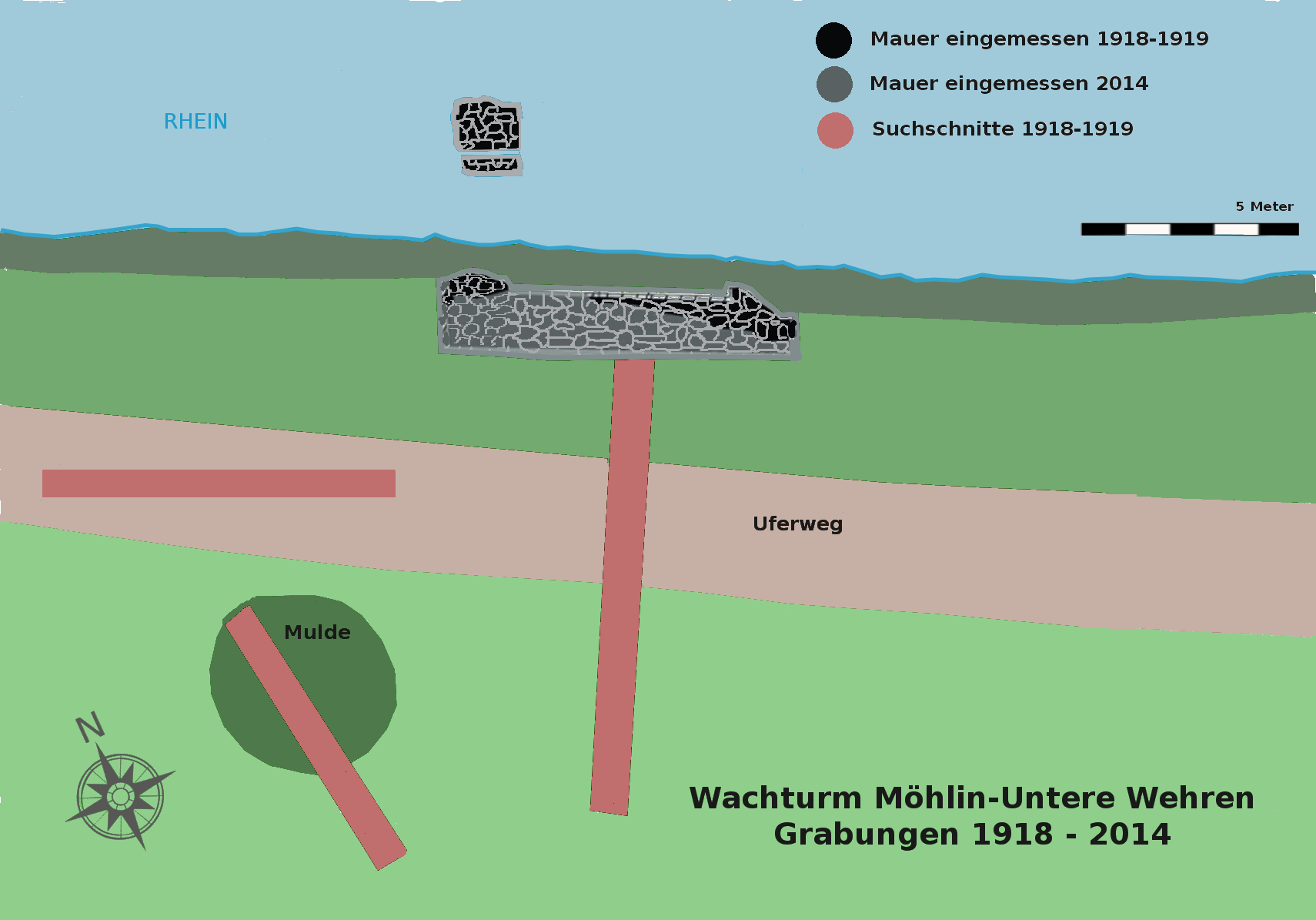 Spätrömischer Wachturm Möhlin-Untere Wehren, Donau-Iller-Rhein-Limes, im Rahmen der Sanierungsarbeiten von 2014 neu vermessener und schematisch ergänzter Grundrissplan von 1919 (Karl Stehlin).